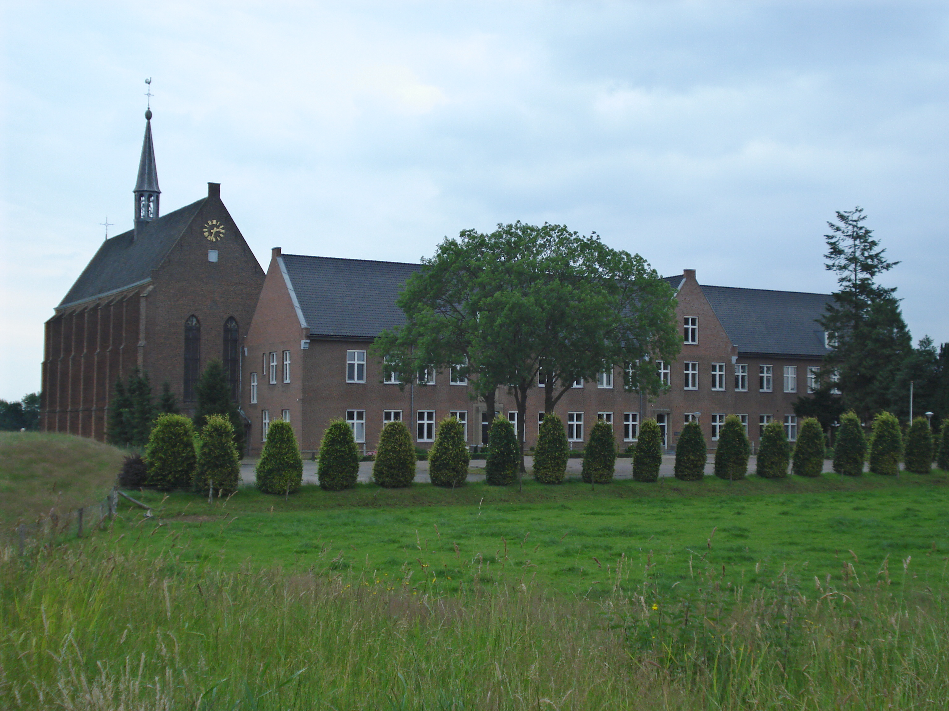 Sint Agatha, le couvent des chanoines de la Sainte-Croix